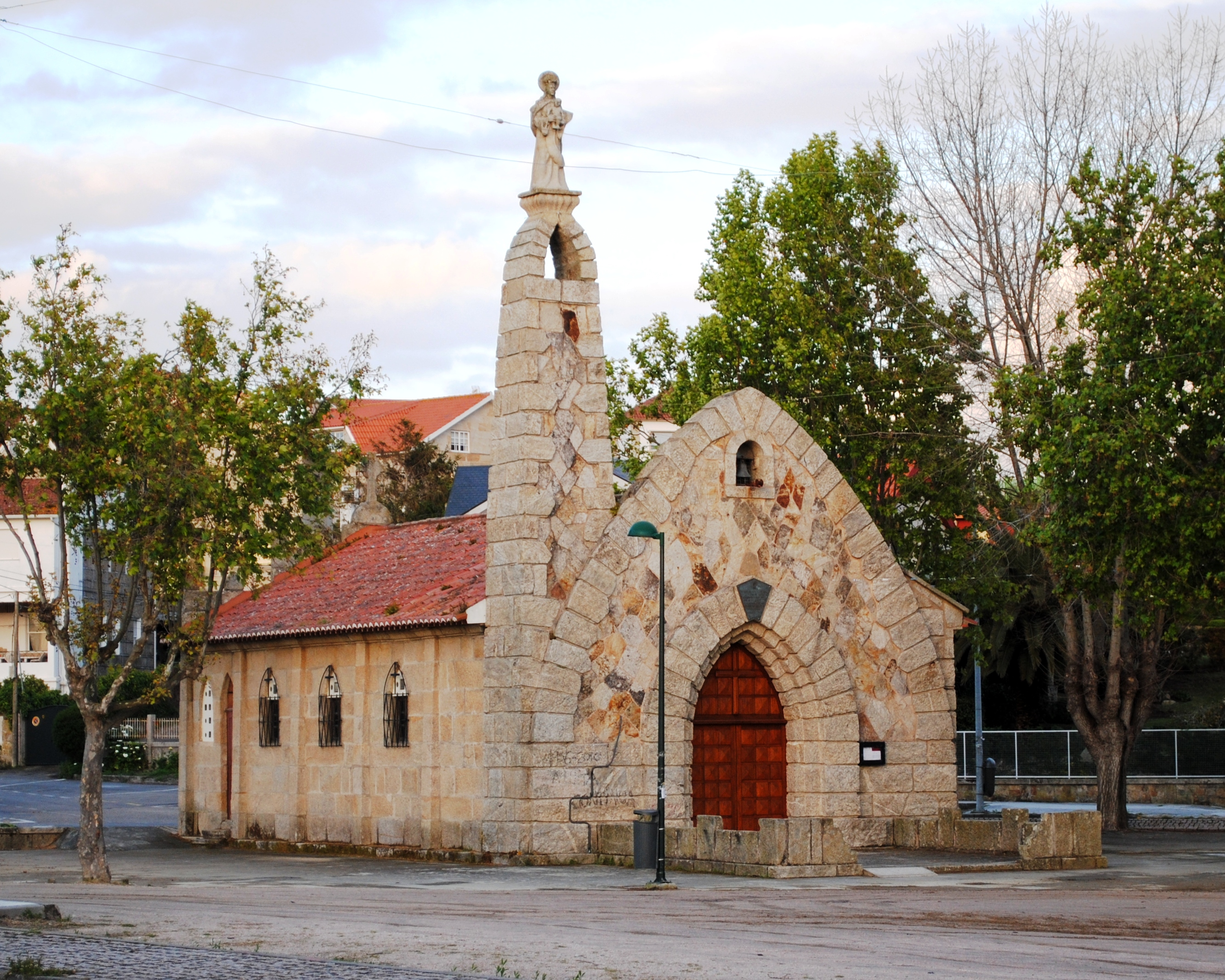 Capela Nosa Señora do Carme, no Vao, Coruxo